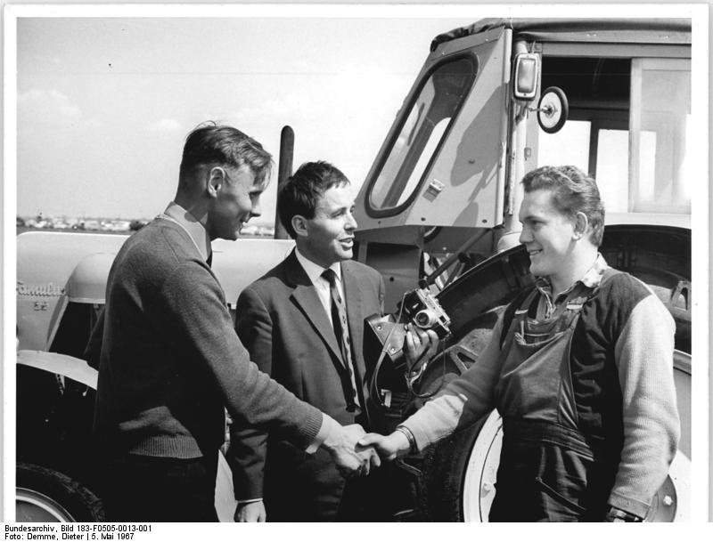 Gebesee, Leistungspflügen, Sieger im Gespräch Zentralbild Demme 5.5.1967 Erfurt: Beim IV. Bezirksausscheid im Leistungspflügen in Gebesee gratuliert der litauische Traktorist Gerdzinas Vincas (links), der den 16.Platz belegte, dem zweifachen DDR-Meister Klaus Zimmermann (rechts) von der LPG Kleinurleben, Kreis Langensalzen, zu seinem Sieg. In der Mitte Levnas Stepanauskas, Korrespondent der Zeitung "Tiesa". An diesem Wettbewerb beteiligten sich 26 Traktoristen aus dem Bezirk Erfurt und drei litauische Traktoristen als Gäste.